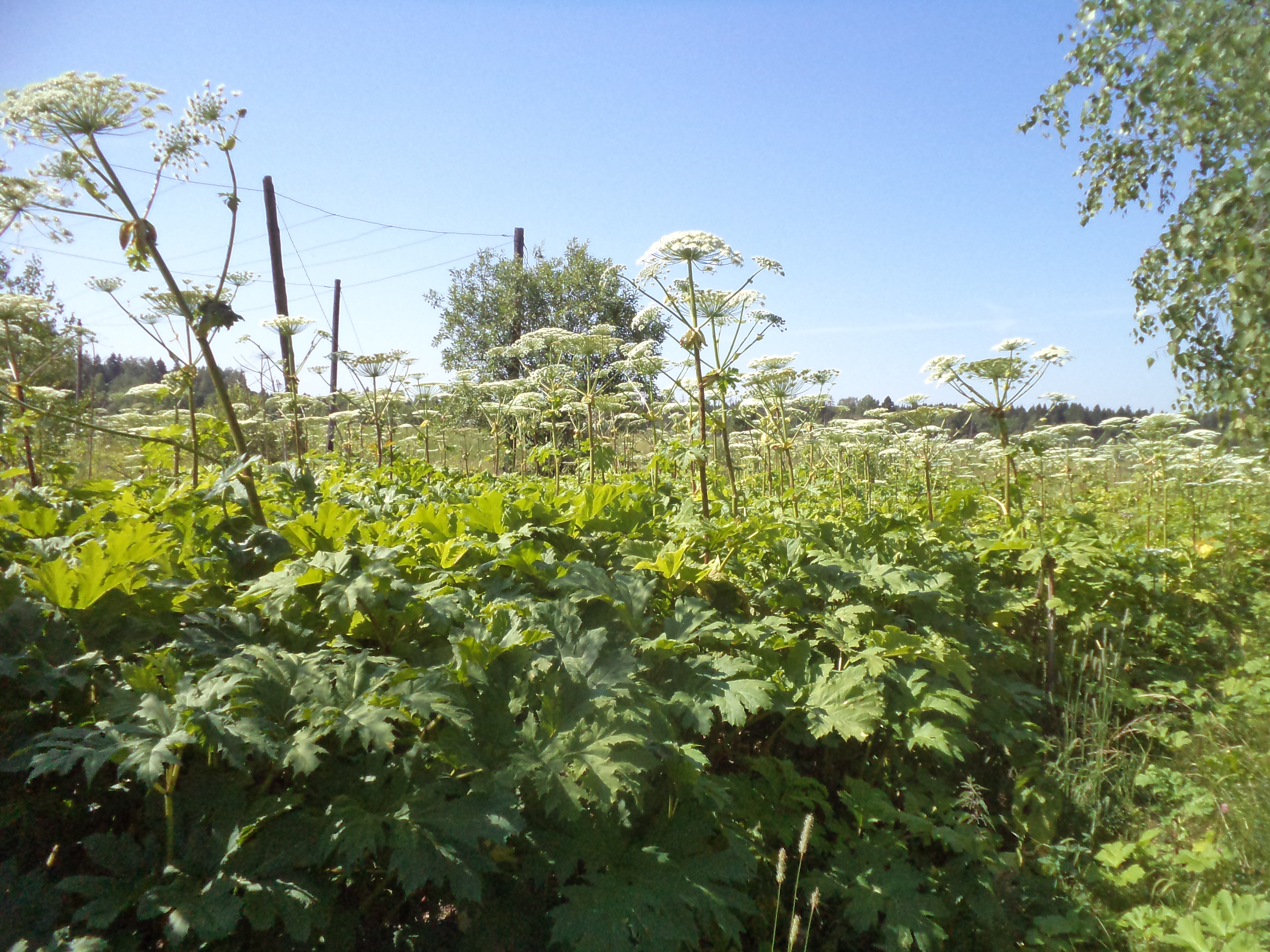 Борщевик в Сергиево-Посадском р-не.